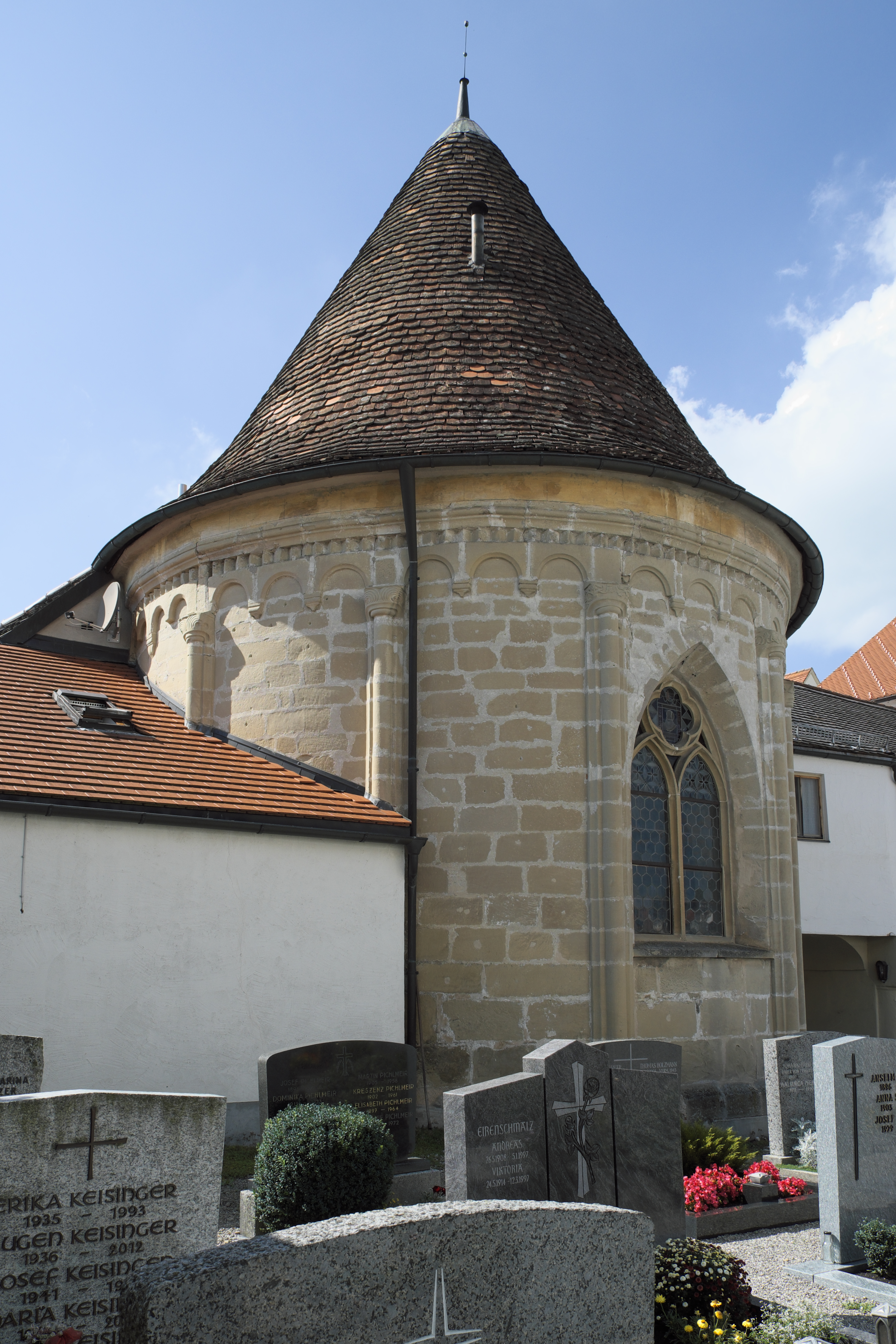 Johanneskapelle des ehemaligen Prämonstratenserklosters in Steingaden im Landkreis Weilheim-Schongau (Bayern/Deutschland)